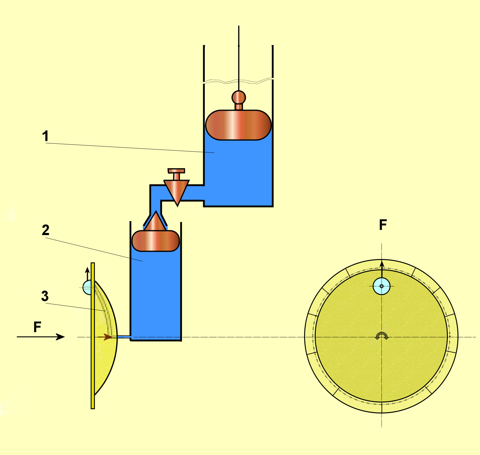 Schéma de moteur hydraulique pour heures temporaires d'horloges des civilisations arabes.